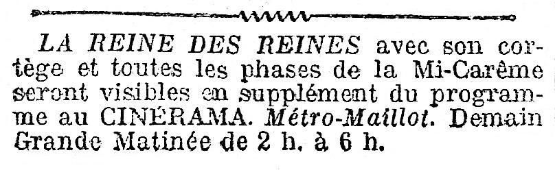 Annonce de la projection d'un film d'actualités sur les fêtes de la Mi-Carême 1914 à Paris. La Presse, 19 mars 1914, page 1, 1ère colonne.